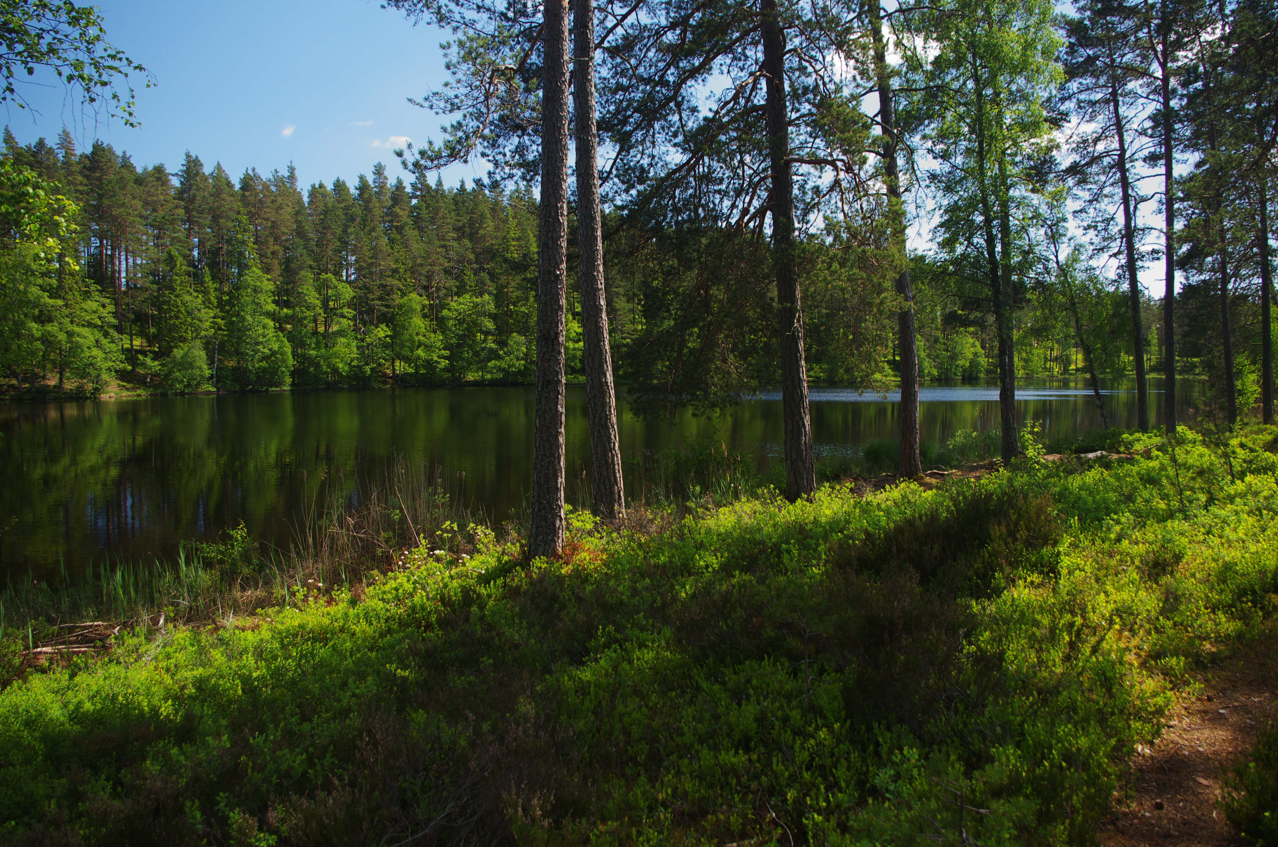 Lilla Öjasjön är en mindre fiskesjö på Hökensås i Tidaholms kommun i Västergötland i Sverige.